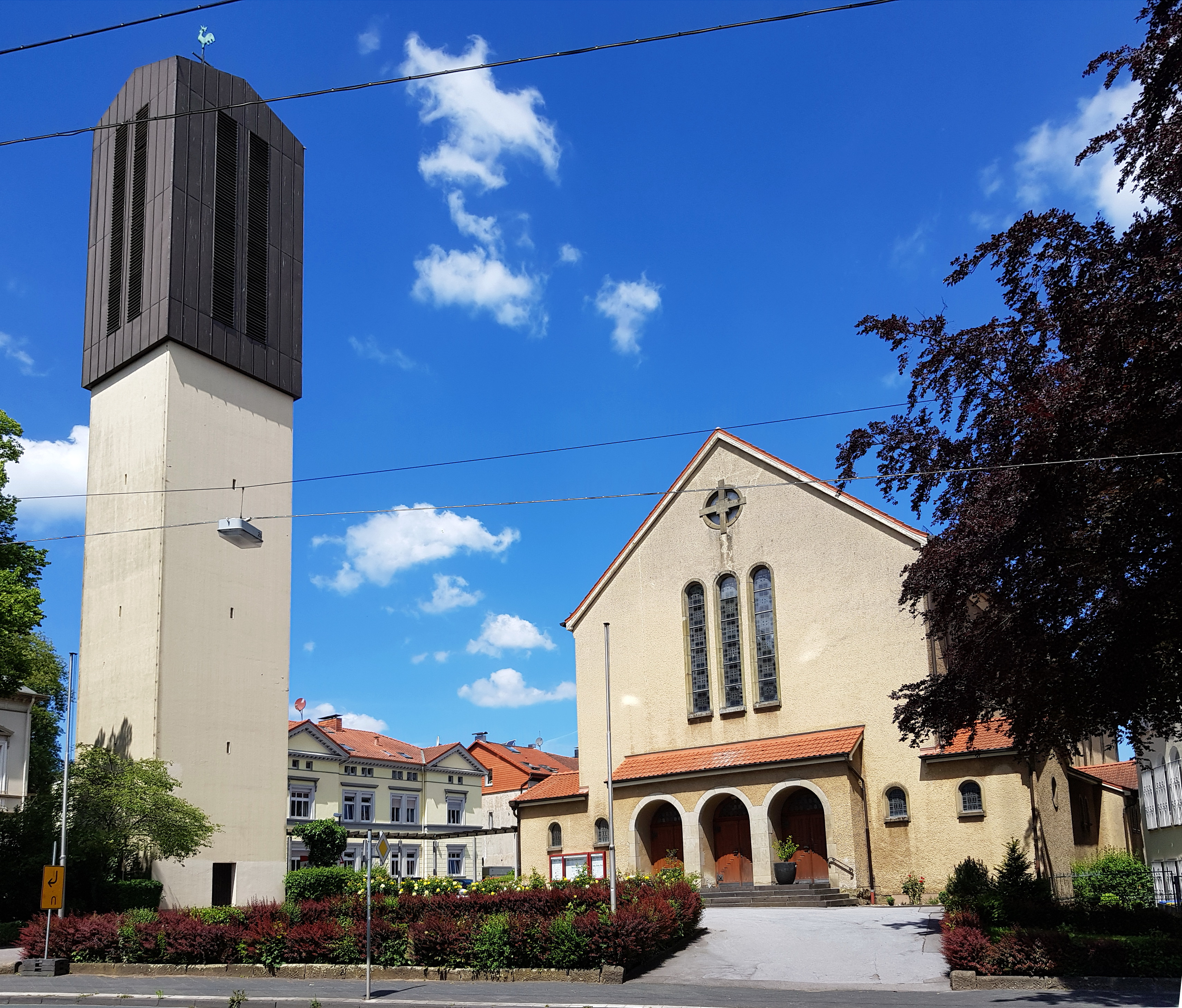 Heilig-Geist-Kirche in Iserlohn, Hans-Böckler-Straße 50.